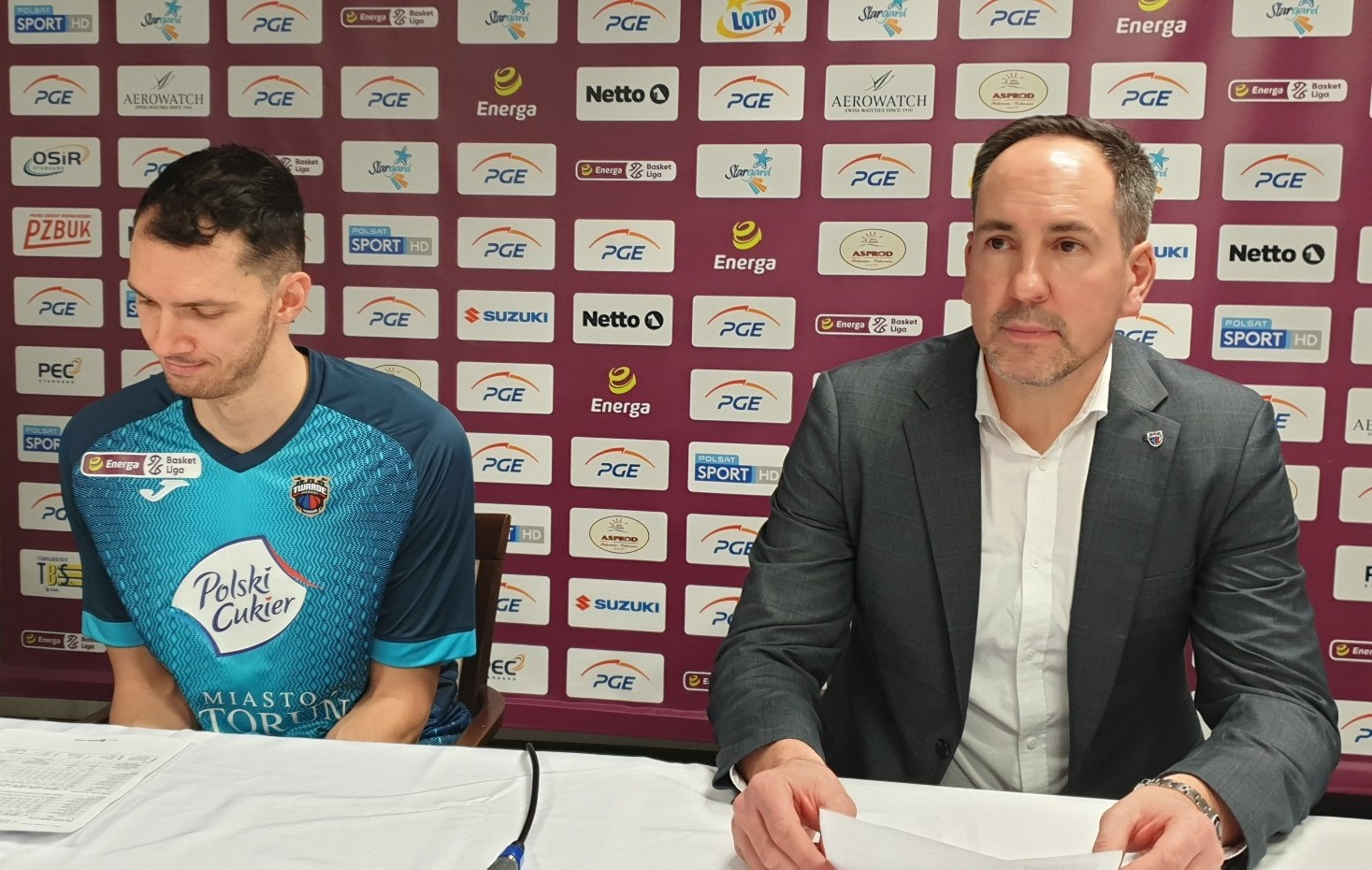 Trener Polski Cukier Toruń - Sebastian Machowski